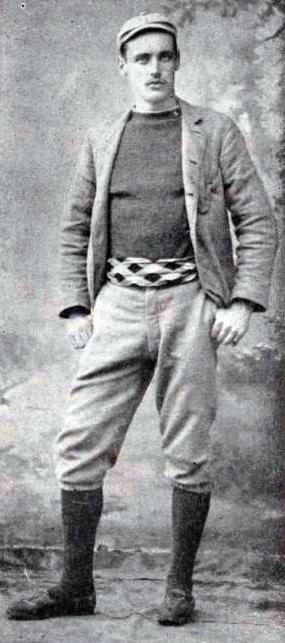 Georges Pilkington Mills, vainqueur du premier Bordeaux-Paris, en 1891.